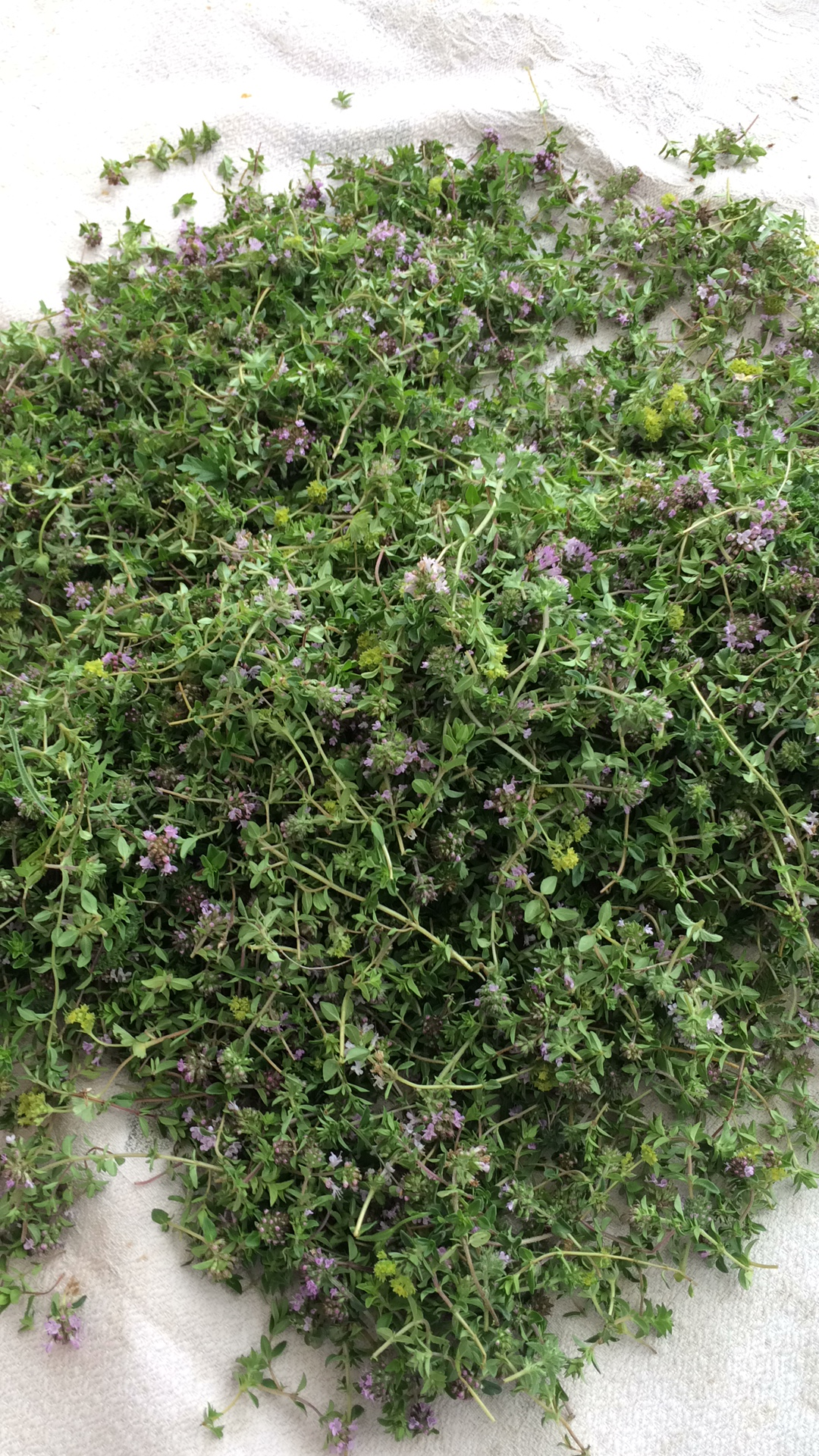 Соцветия и побеги тимьяна холмового, собранные для сушки. Кулинский район, Дагестан.